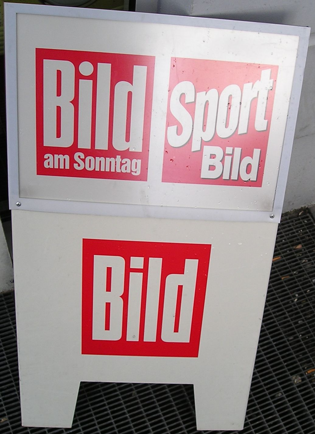 Reklame-Aufsteller der Bild Zeitung